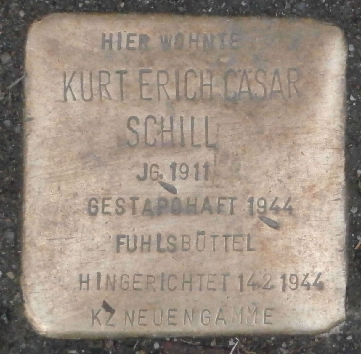 Stolpersteine für Kurt Erich Cäsar Schill